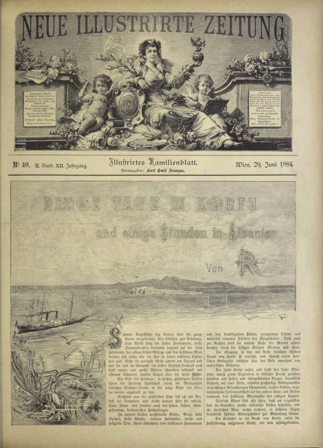 Néhány nap Korfun és néhány óra Albániában, Rudolf írása a Neue Illustrirte Zeitungban, első rész